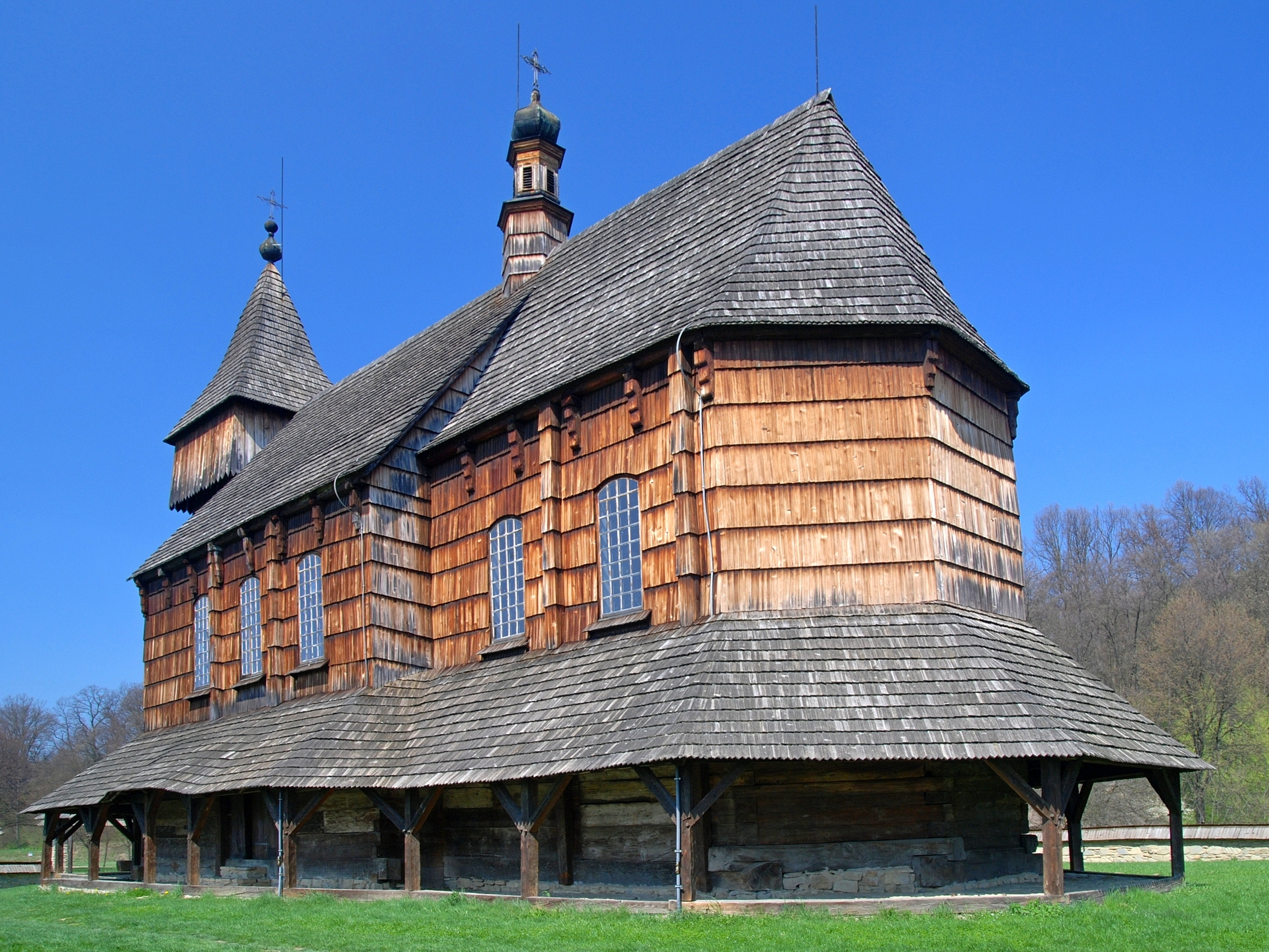 miasto Sanok, Park Etnograficzny MBL